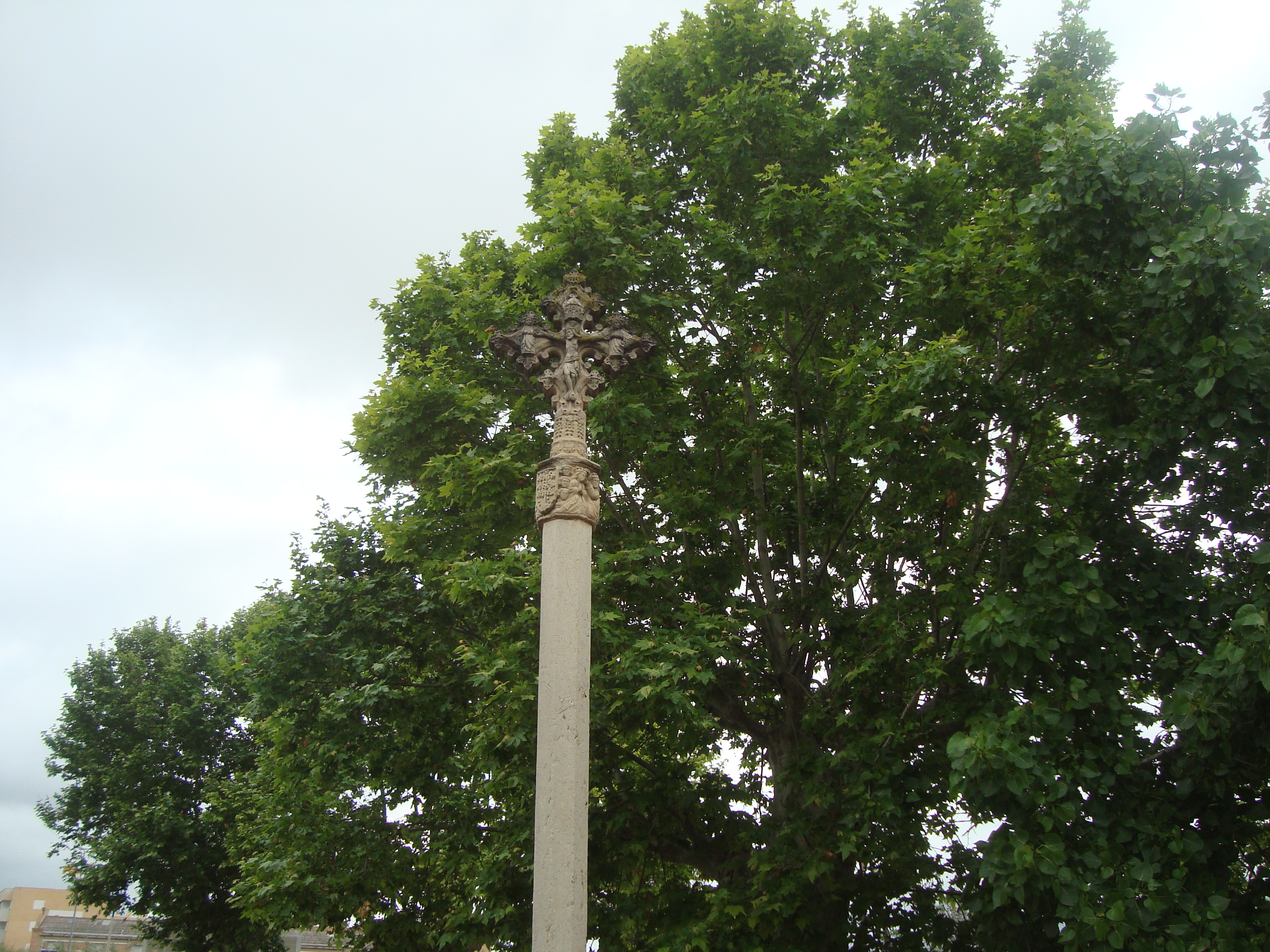 Creu de terme del Lloret (Ulldecona)